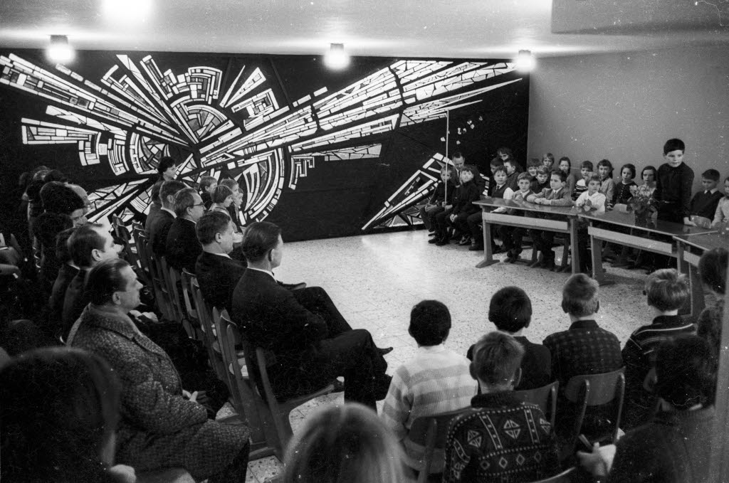 Einweihung. Im Hintergrund das Fenster des schleswig-holsteinischen Künstlers Ernst-Günter Hansing, das einen explodierenden Stern und die Entstehung der Welt zeigt.